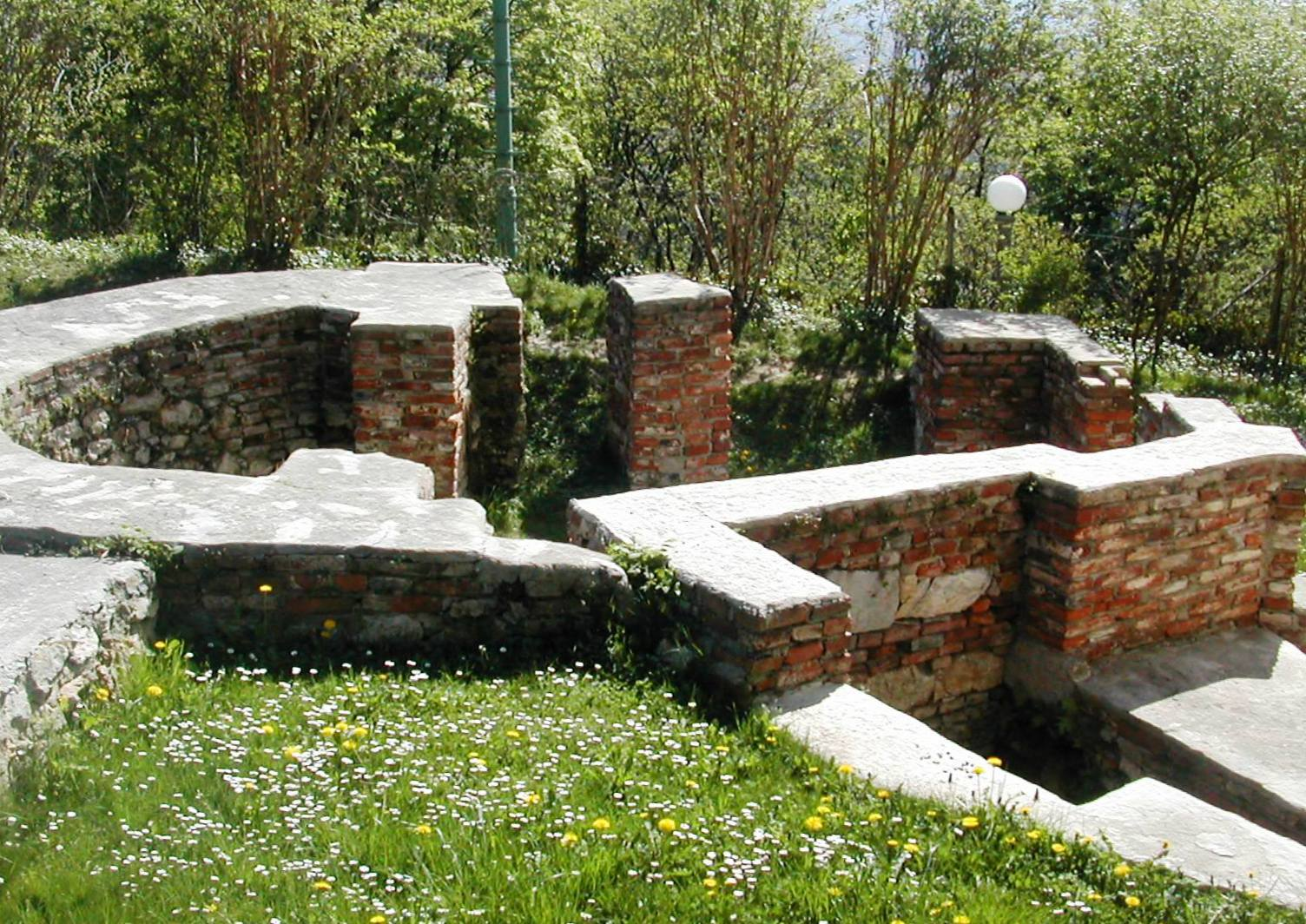 Thomaskapelle auf dem Grazer Schloßberg